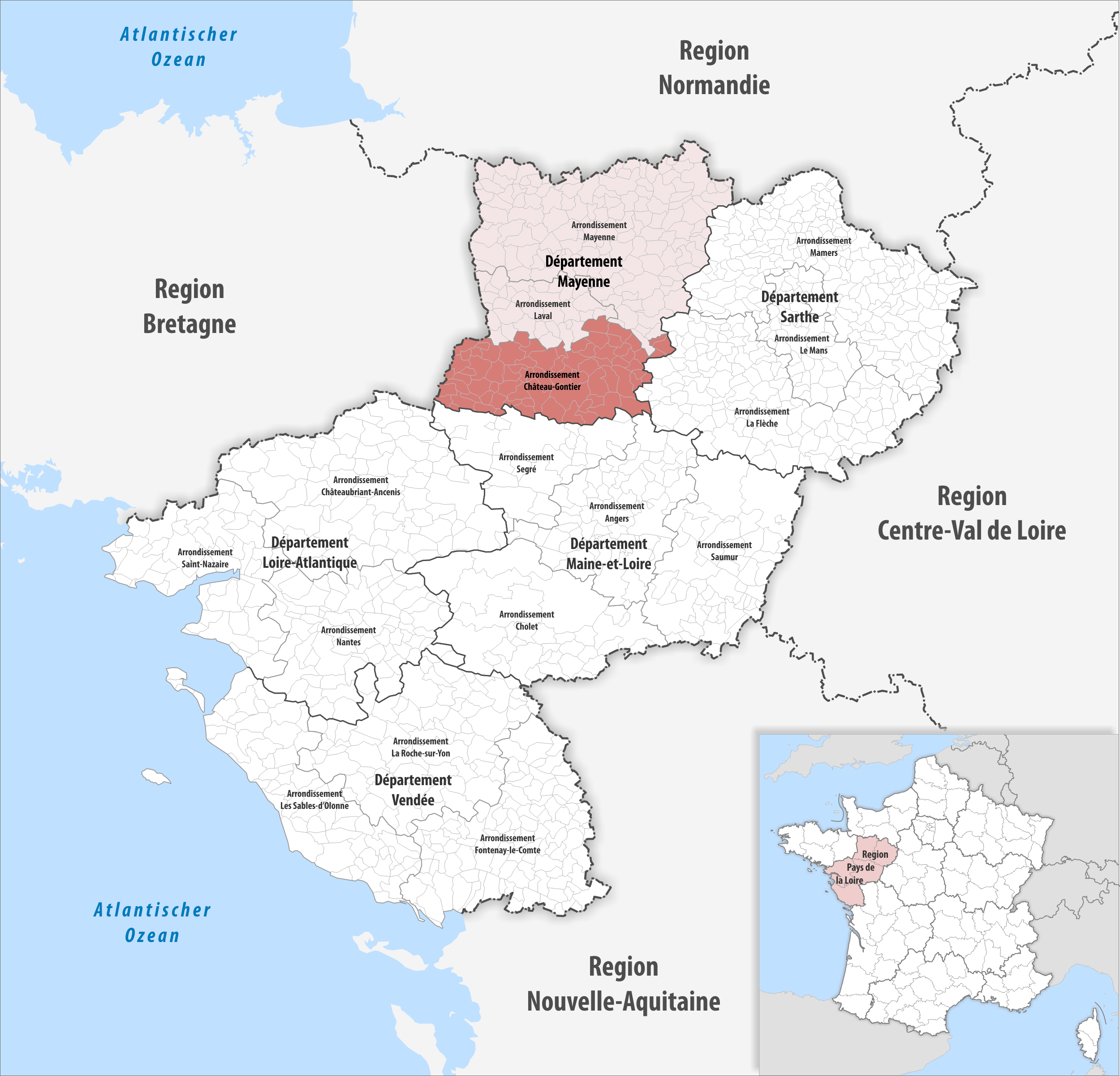 Lage des Arrondissements Château-Gontier